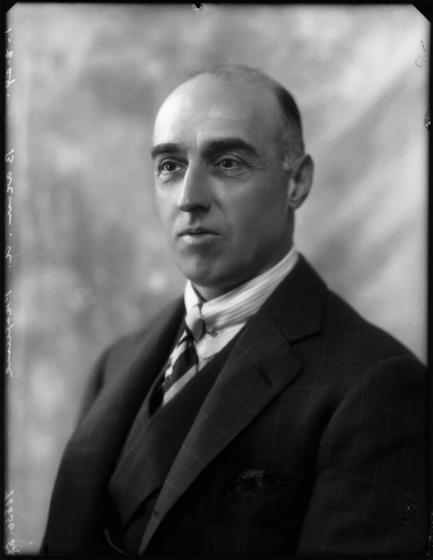 lord profumo